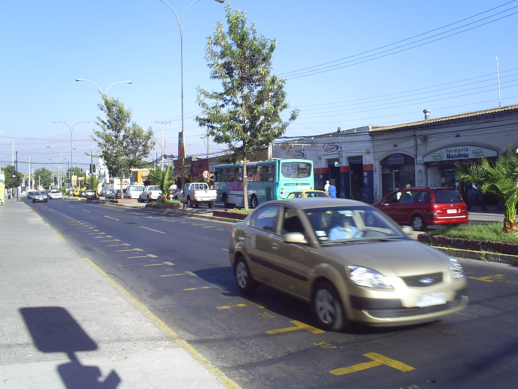 Carrascal esq. Aviador Bleriot